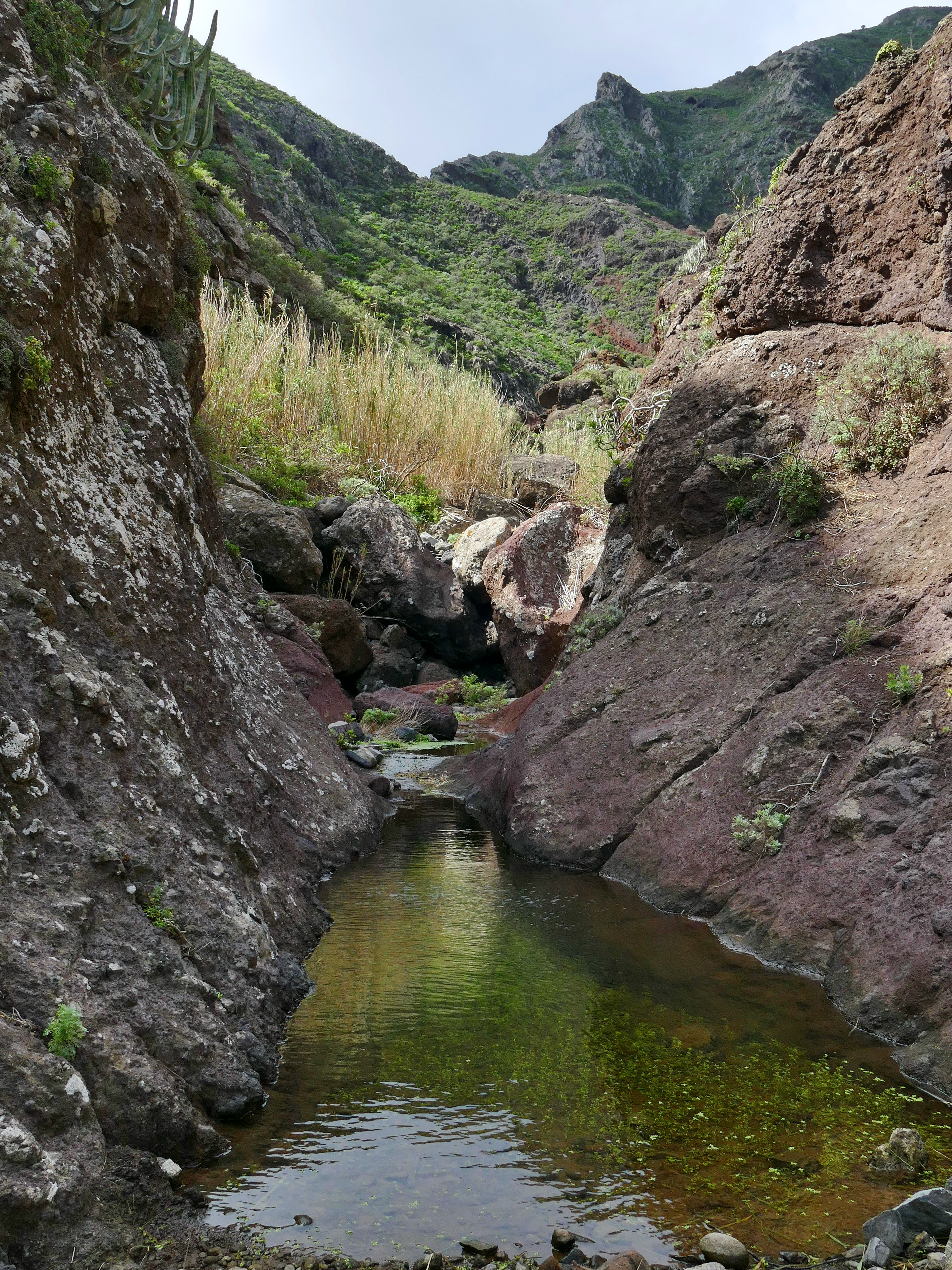 Barranco de Chamorga (Parque Rural de Anaga en Tenerife) This is a photography of a Special Area of Conservation in Spain with the ID: ES7020095. Natura2000 entry, EEA entry